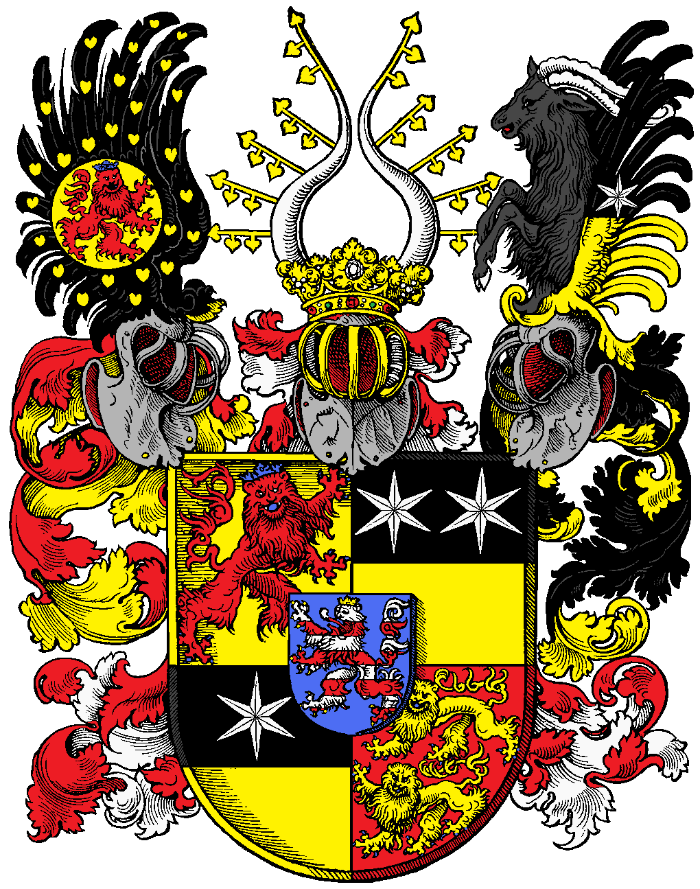 Wappen des Landgrafen Philipp von Hessen, Von Gottes gnaden Philips Landtgraff zu Hessen, Graff zu Catzenelnbogen: zu Dietz: Ziegenhain und Nidda. Holzschnitt, Original-Maße: 39,6 × 26,3 cm, Aufbewahrungsort Gotha. (Heraldisch rechts oben: Katzenelnbogen, links oben: Nidda, rechts unten: Ziegenhain, links unten: Diez. In der Mitte: Landgrafschaft Hessen.)